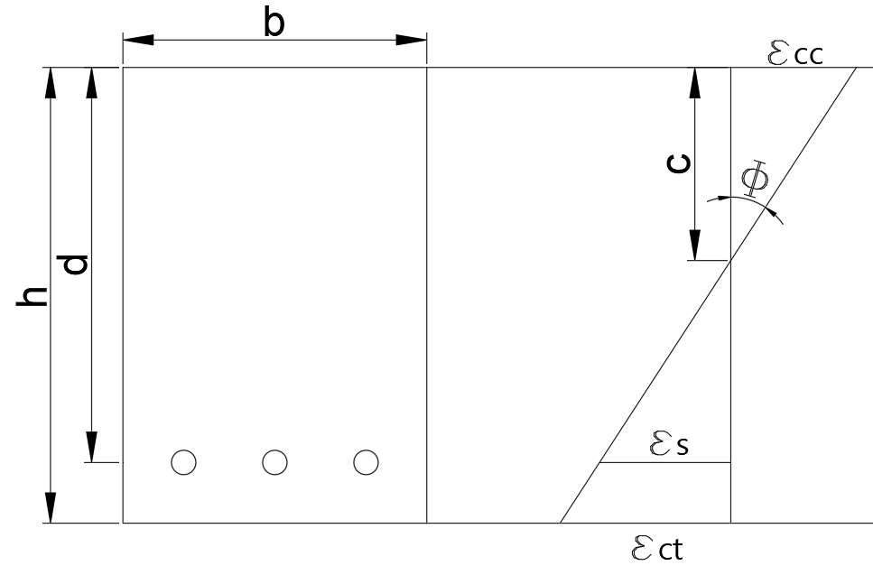 단철근 콘크리트 보의 균열 발생 이전 거동